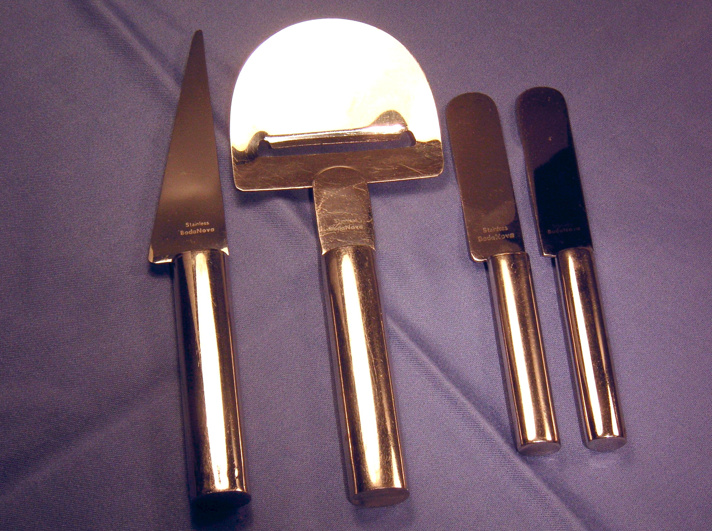 Rostfritt bestick från BodaNova 1980-tal, bestående av ostkniv, osthyvel och två smörknivar